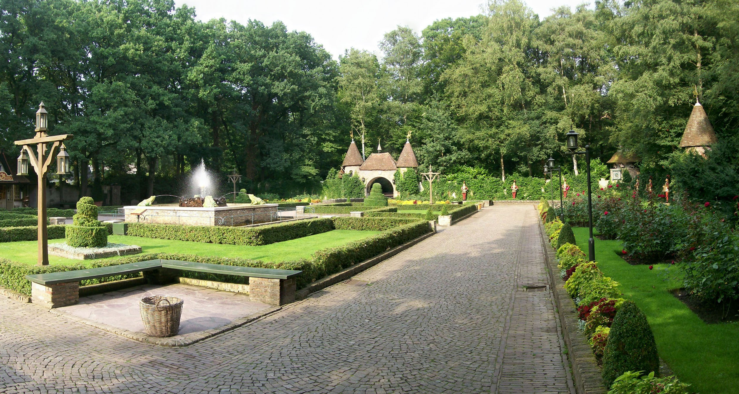 Herald square in Efteling